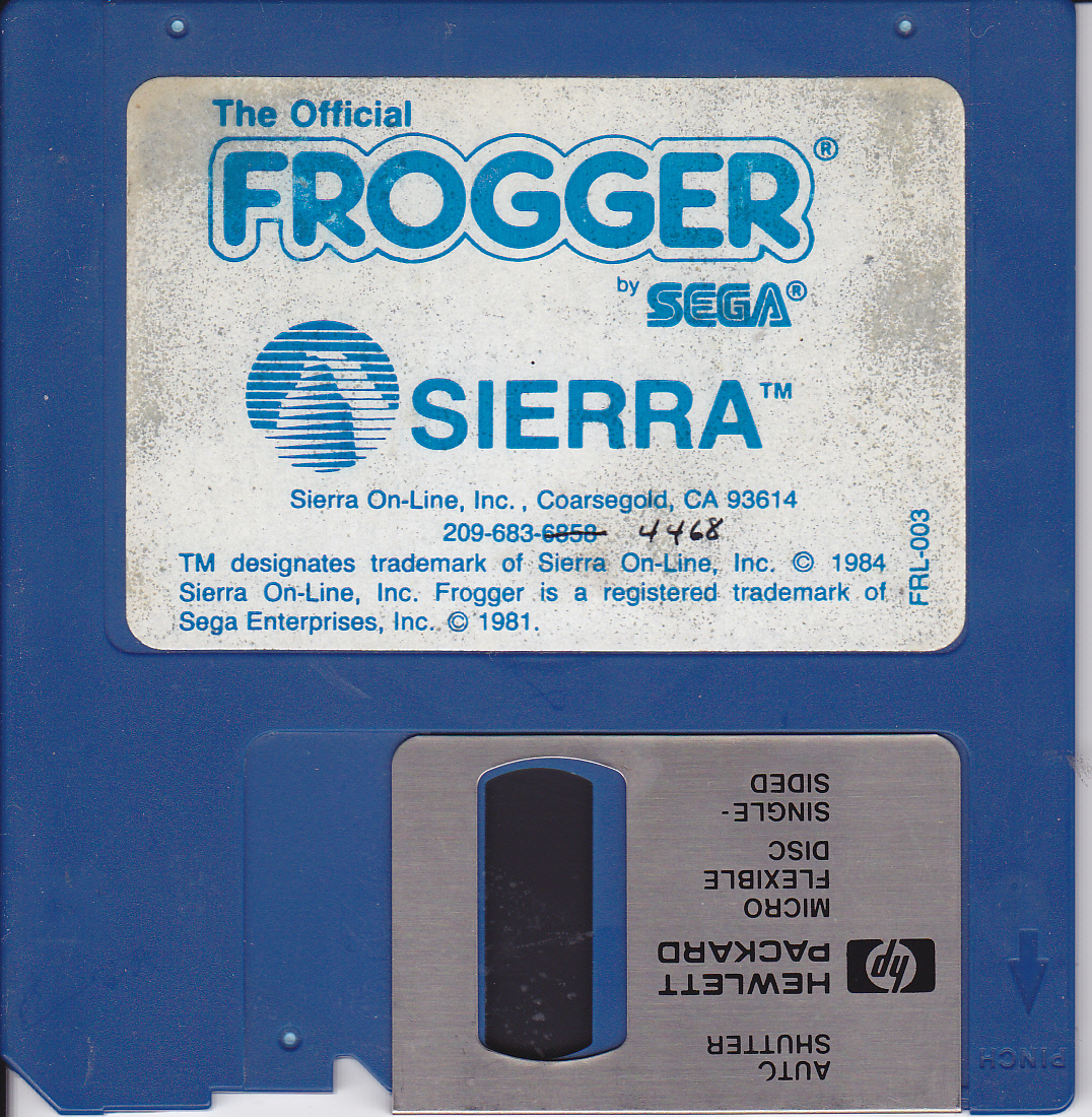 De originele FROGGER diskette van SIERRA voor de versie op de PC.